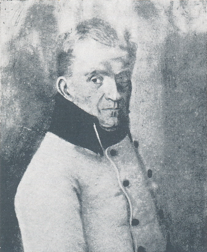 Heinrich Kempen von Fichtenstamm, K. k. Rittmeister, * 17. April 1743 Niedersfeld; † 15. Februar 1827 Ölmütz in Österreich